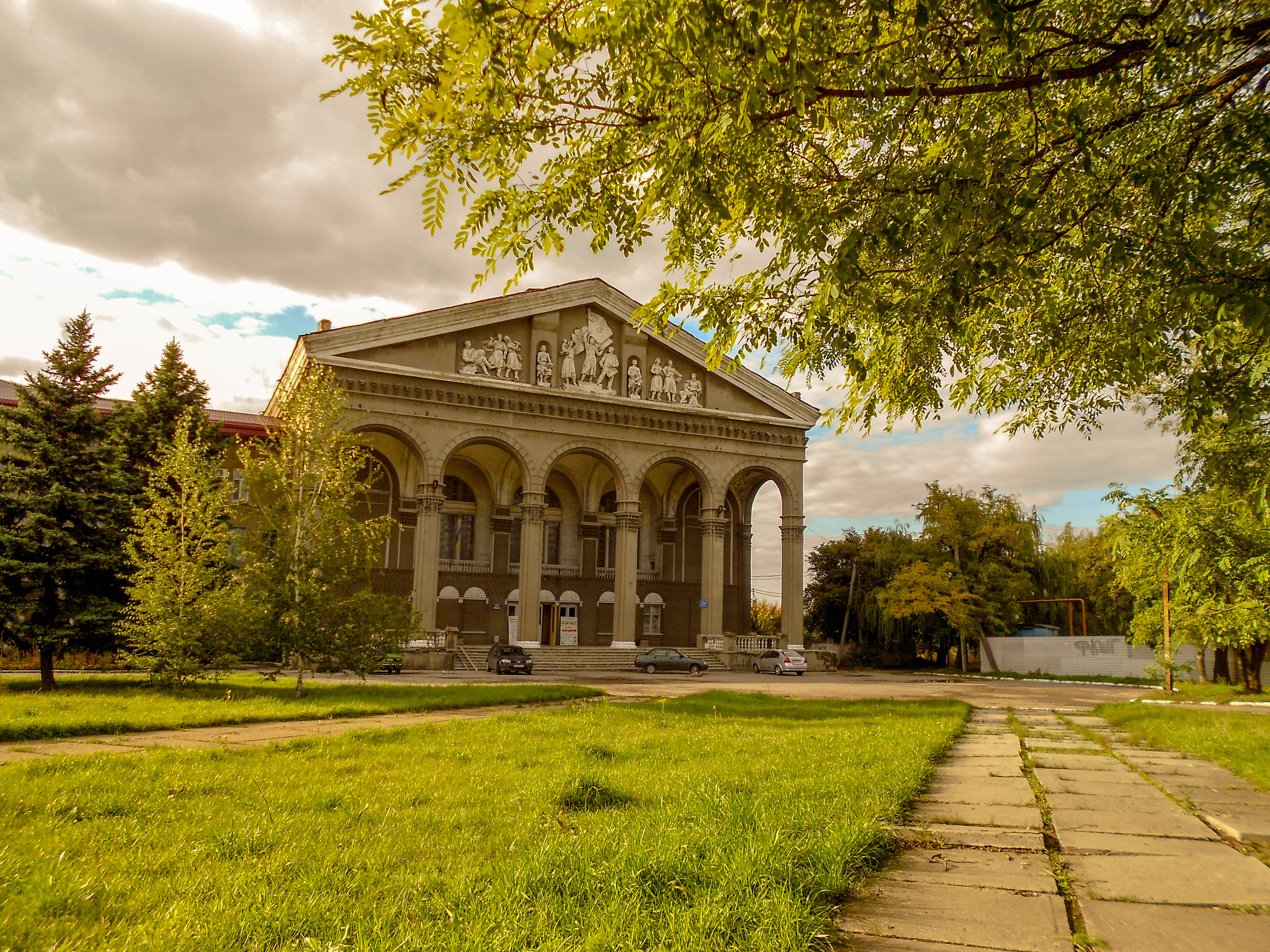 Палац культури, Горлівка, пр.Леніна,1